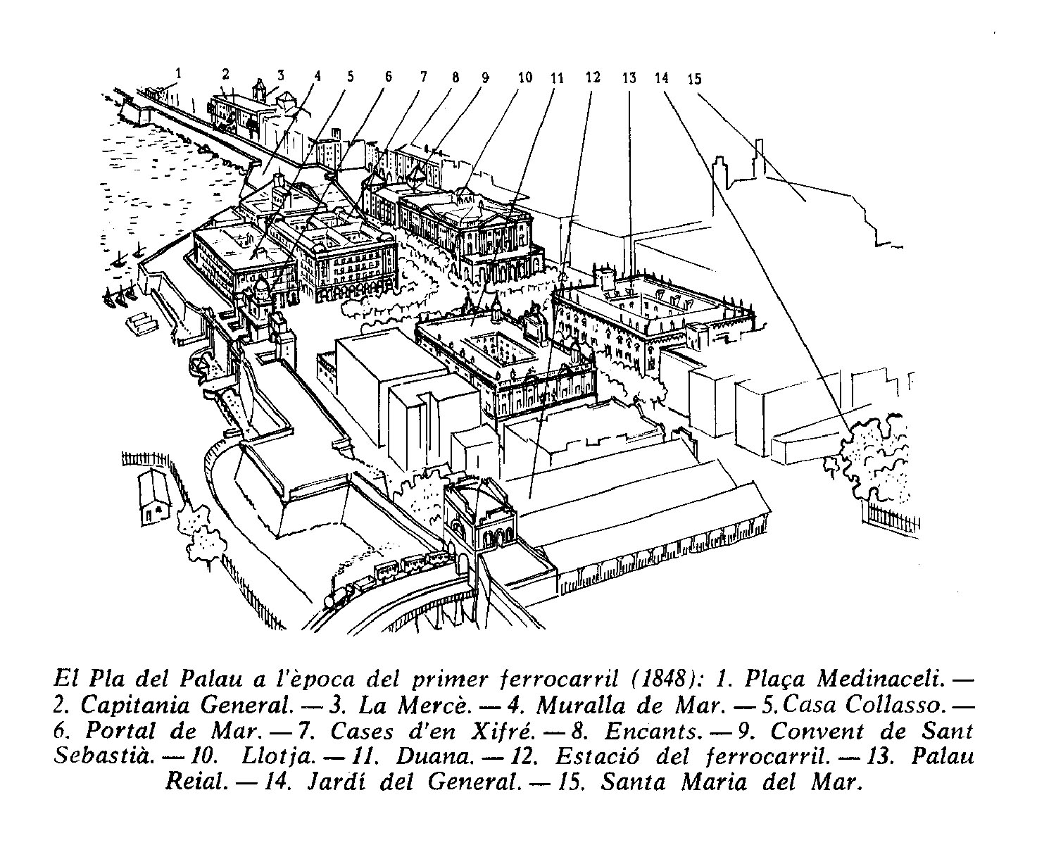 Dibuix original de Cirici per a "Barcelona pam a pam"